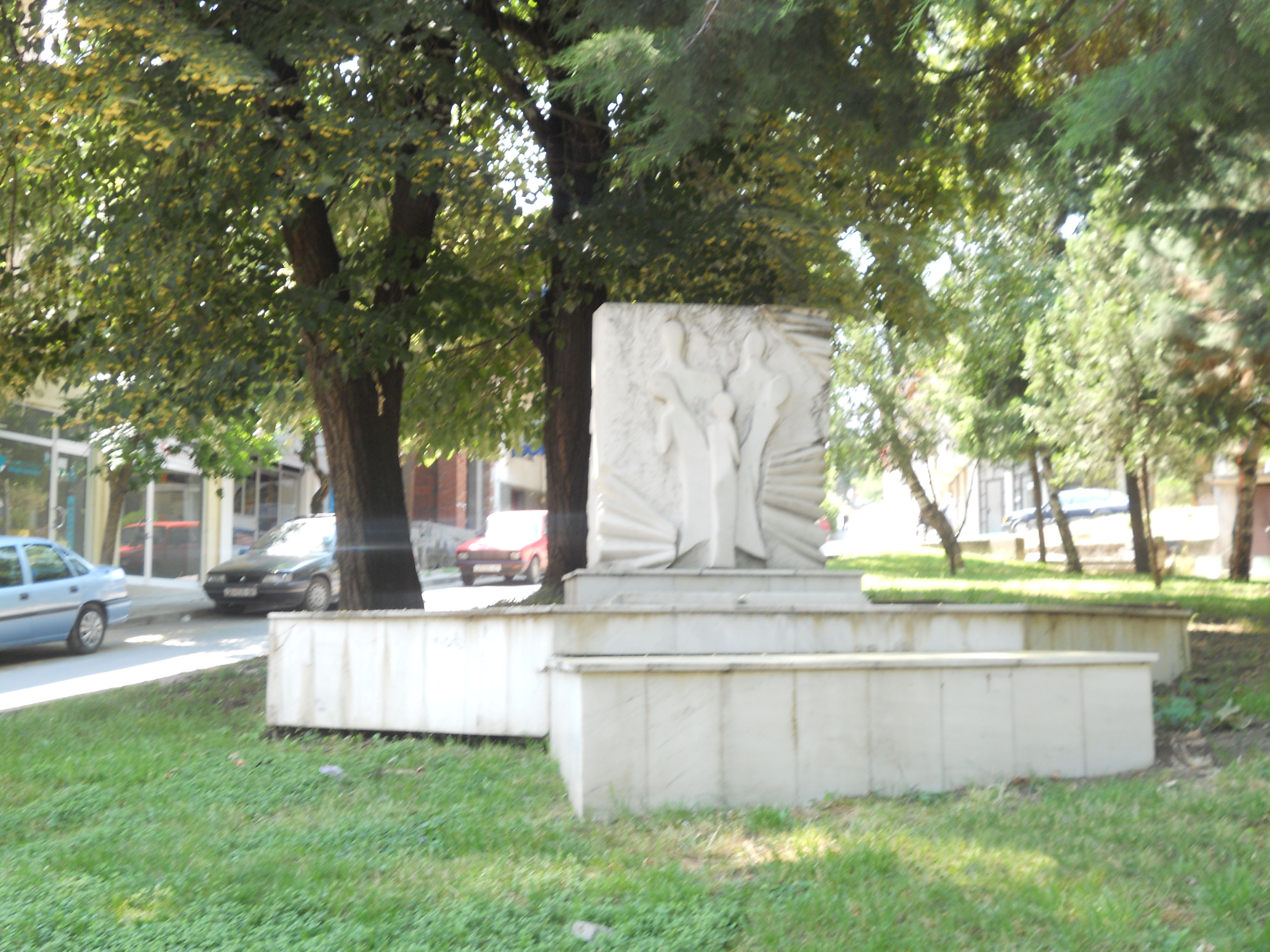 Споменик на петте струмички студенти